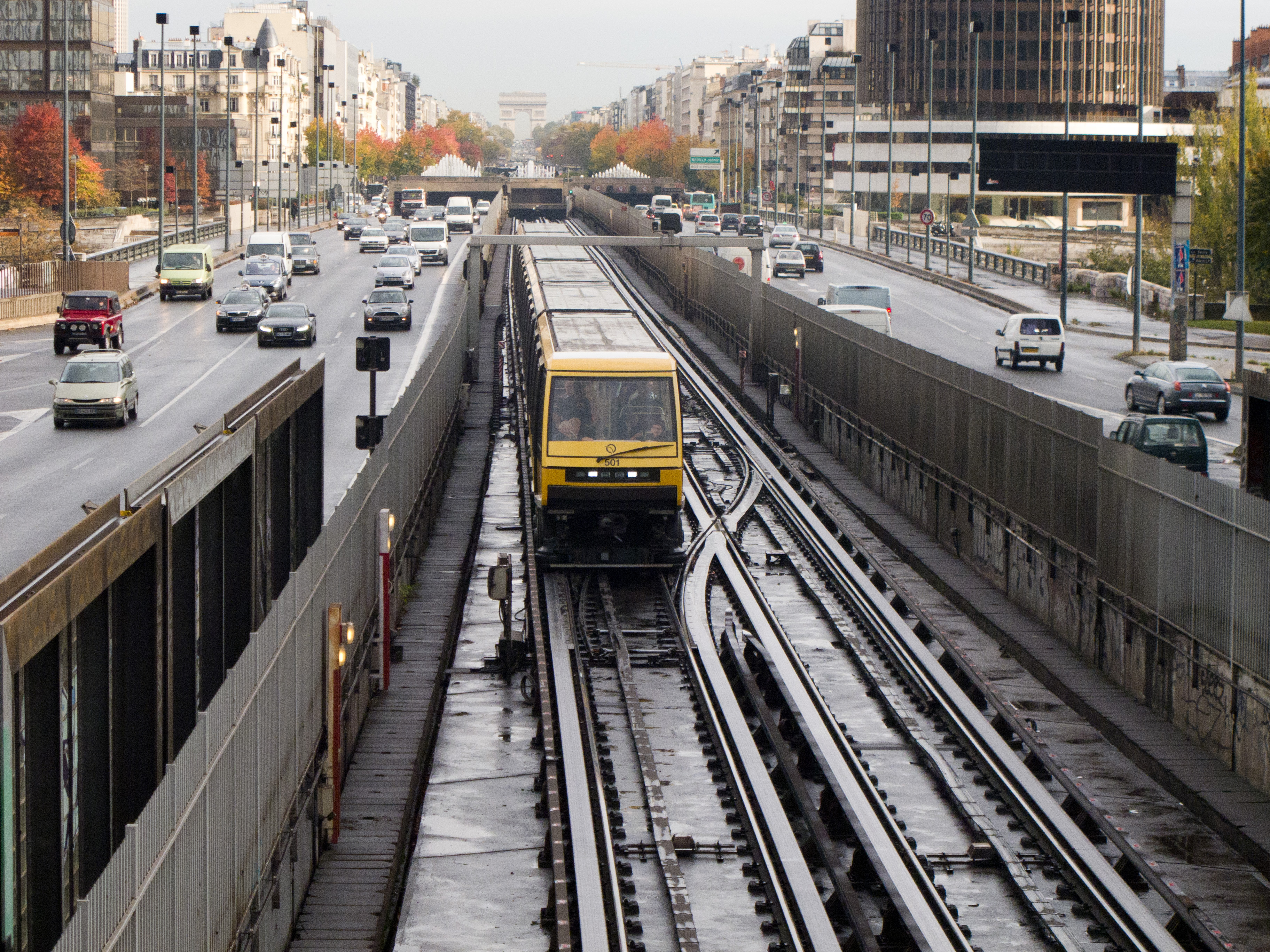 Rame MP05 entrant dans la station Esplanade de La Défense / Ligne 1 du métro de Paris, le jour de sa mise en service sur la ligne. France.